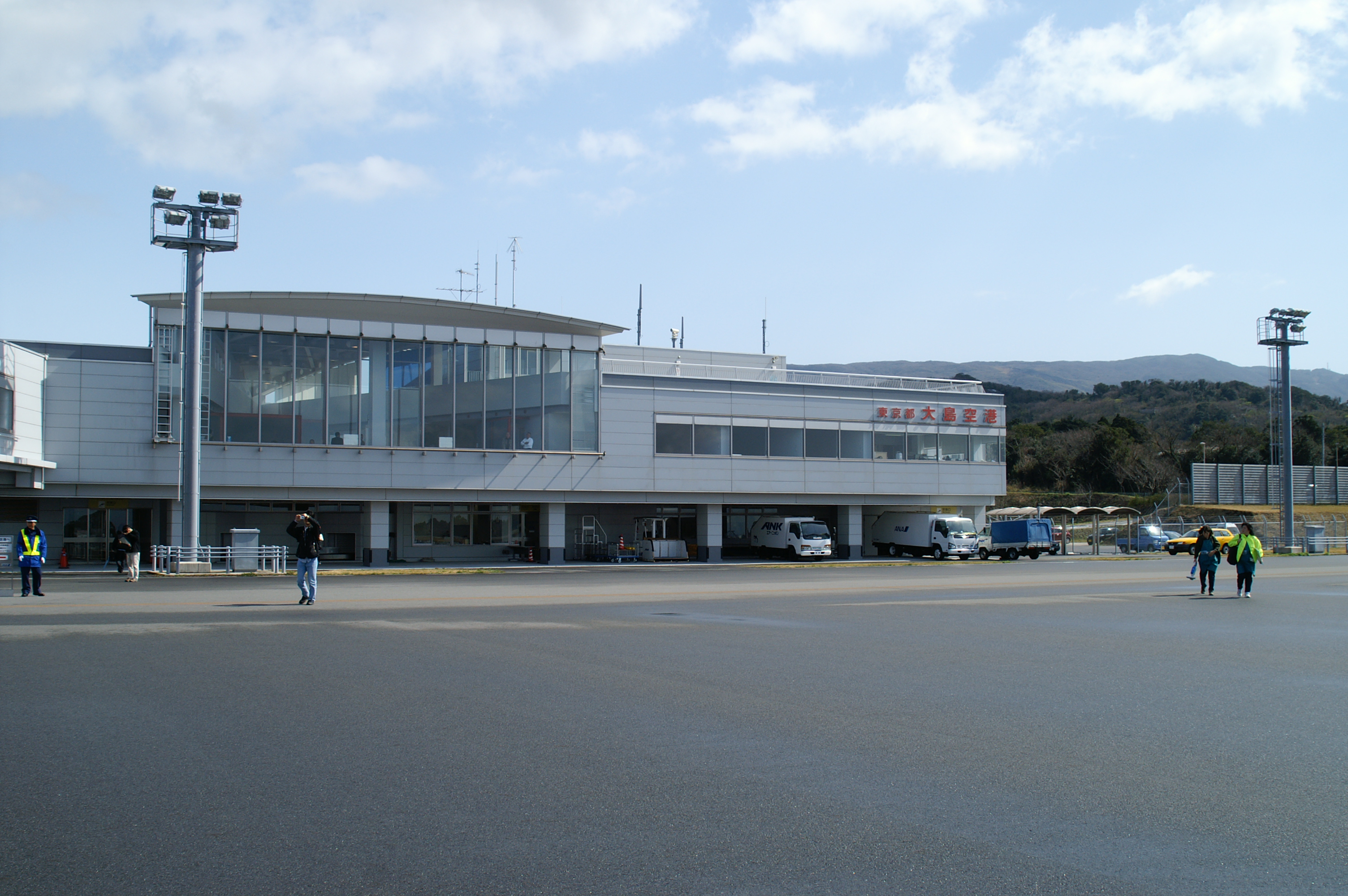 ファイナルアプローチで横風に煽られたけど、なんとか無事に大島空港に到着しました。 (2007/03/11 Oshima Airport, Tokyo, JAPAN)